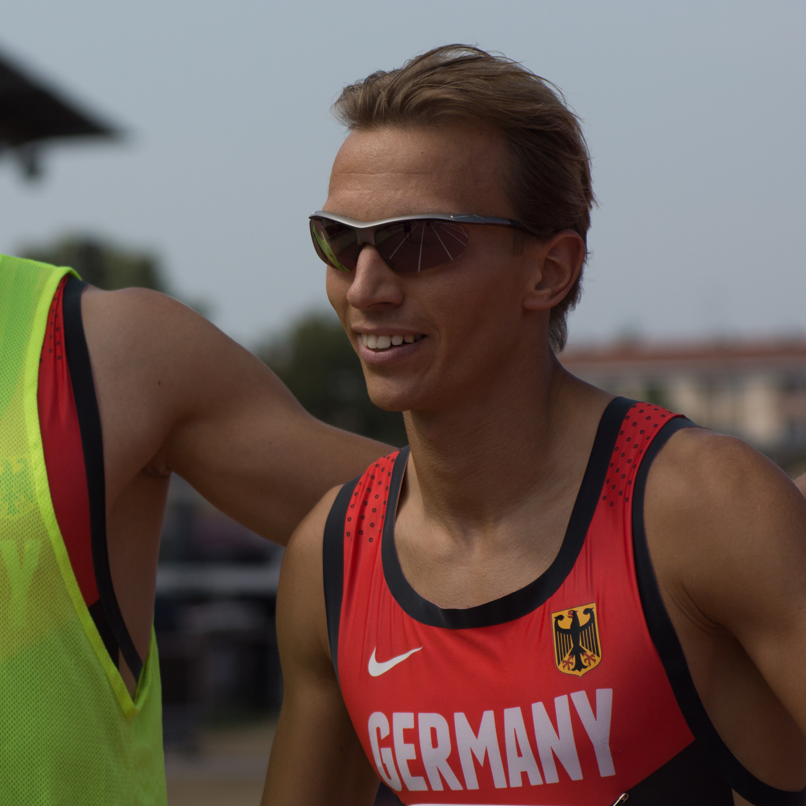 Championnats du monde d'athlétisme handisport 2013.